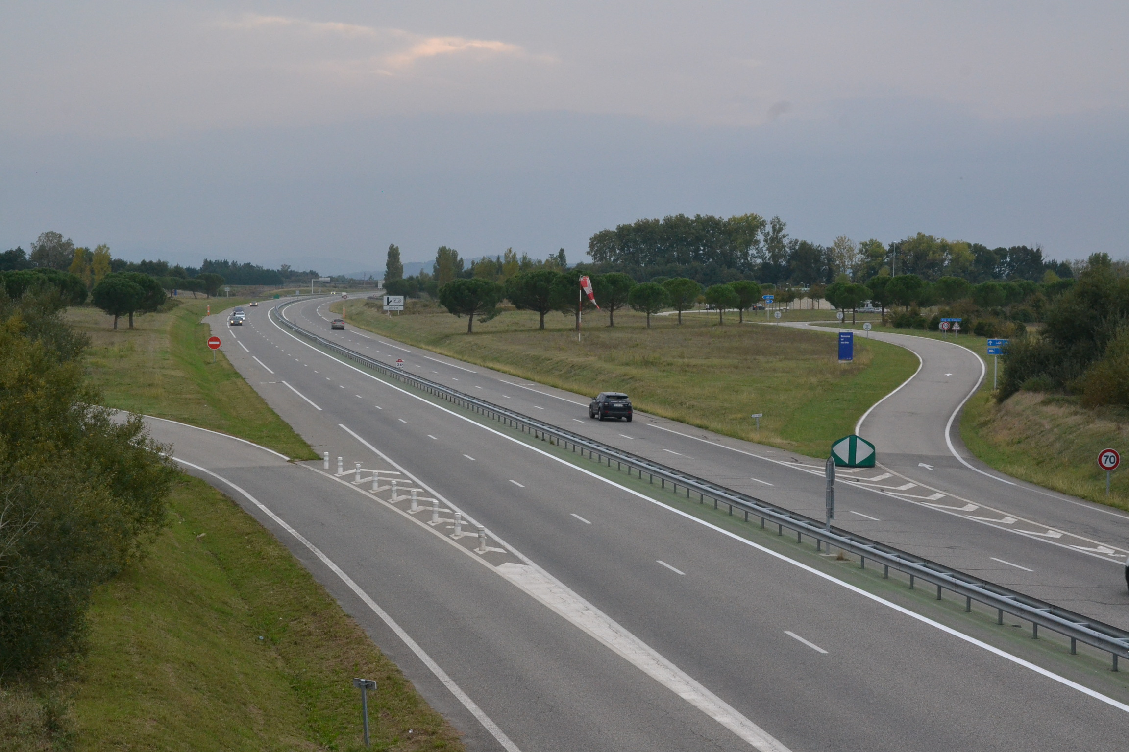 L'autoroute A66 près de Mazères (Ariège, France). Vue vers le sud (aires de Mazères et Rosefond).